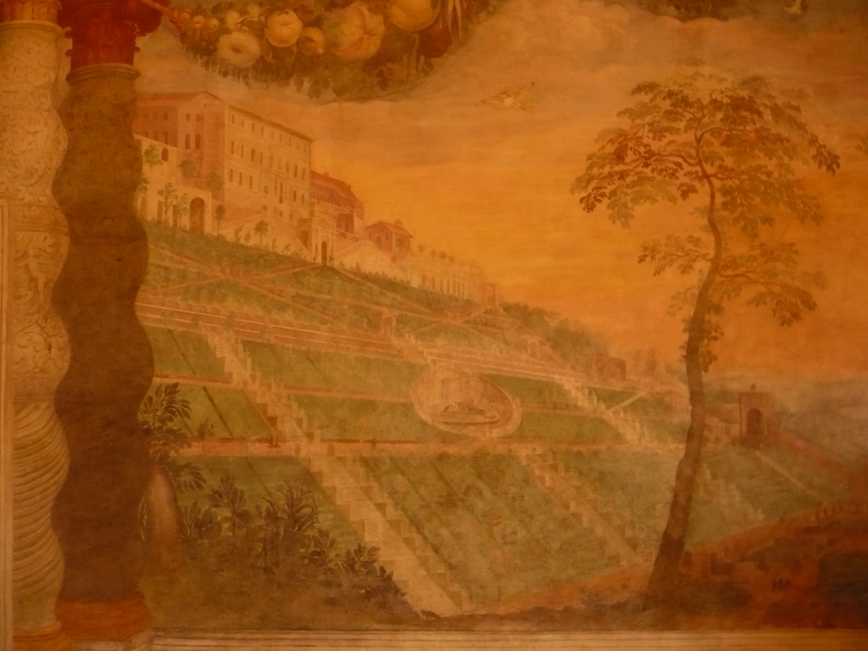 Fresko-Darstellung der im Bau befindlichen Villa d'Este in der Sala di passaggio der Villa d'Este selbst, ca. 1568